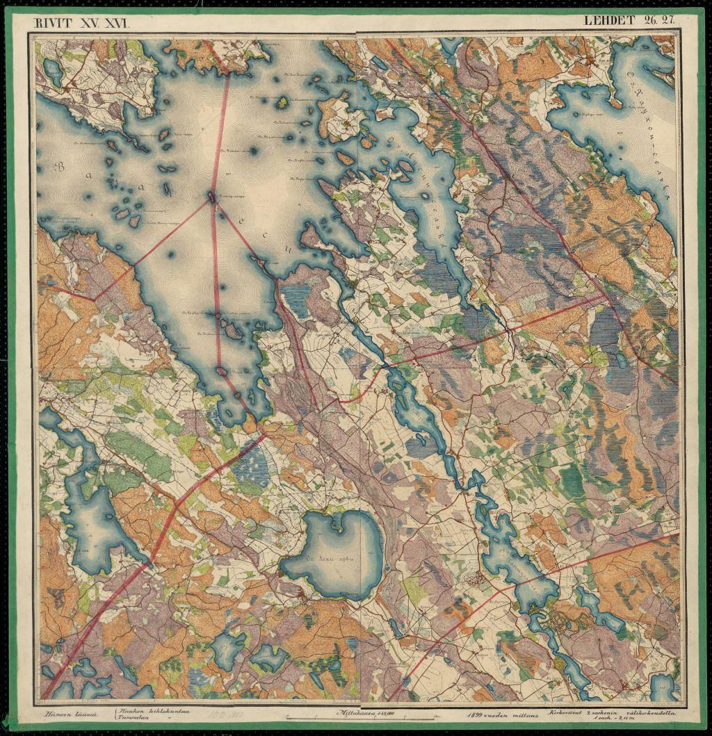 Vanajavesi - venäläinen topografikartta vuodelta 1899